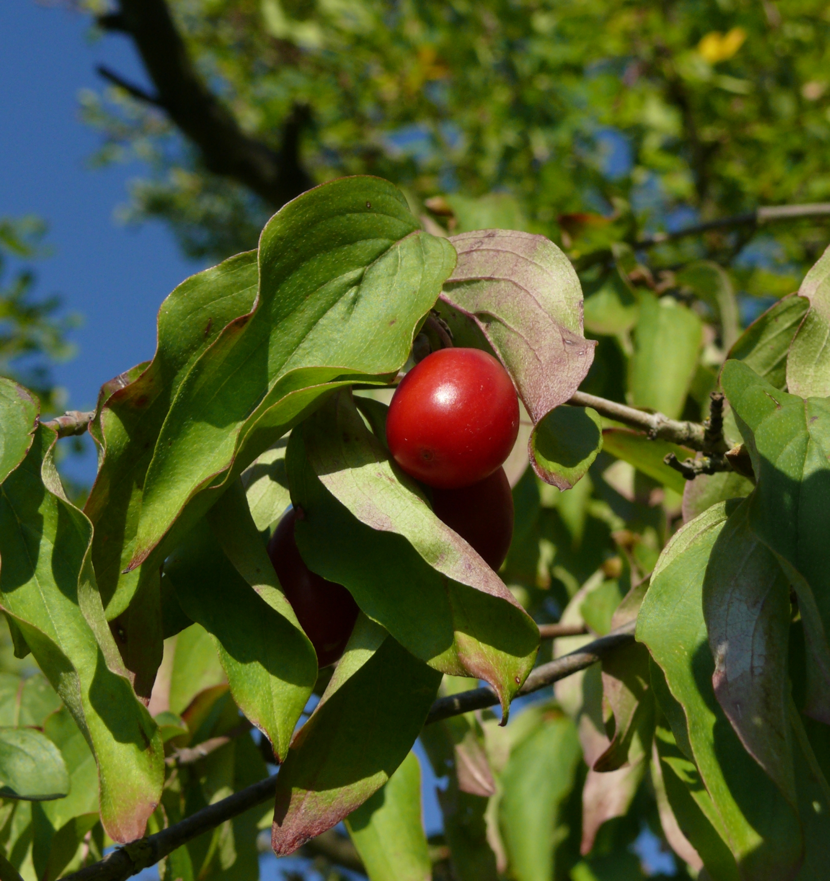 Cornus mas, Schwäbisch-Fränkische Waldberge, Germany